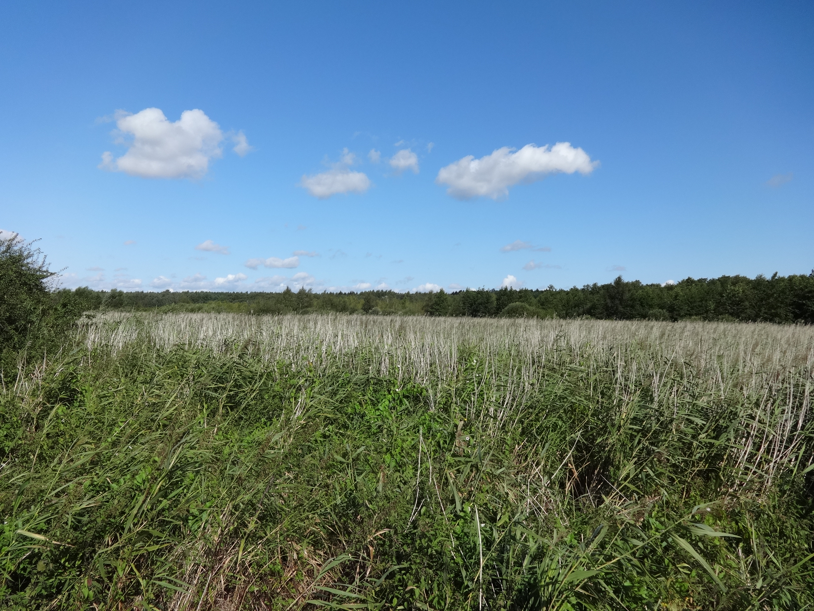 Blick vom Entwässerungsgraben in das Naturschutzgebiet Ladebower Moor in Greifswald, Mecklenburg-Vorpommern